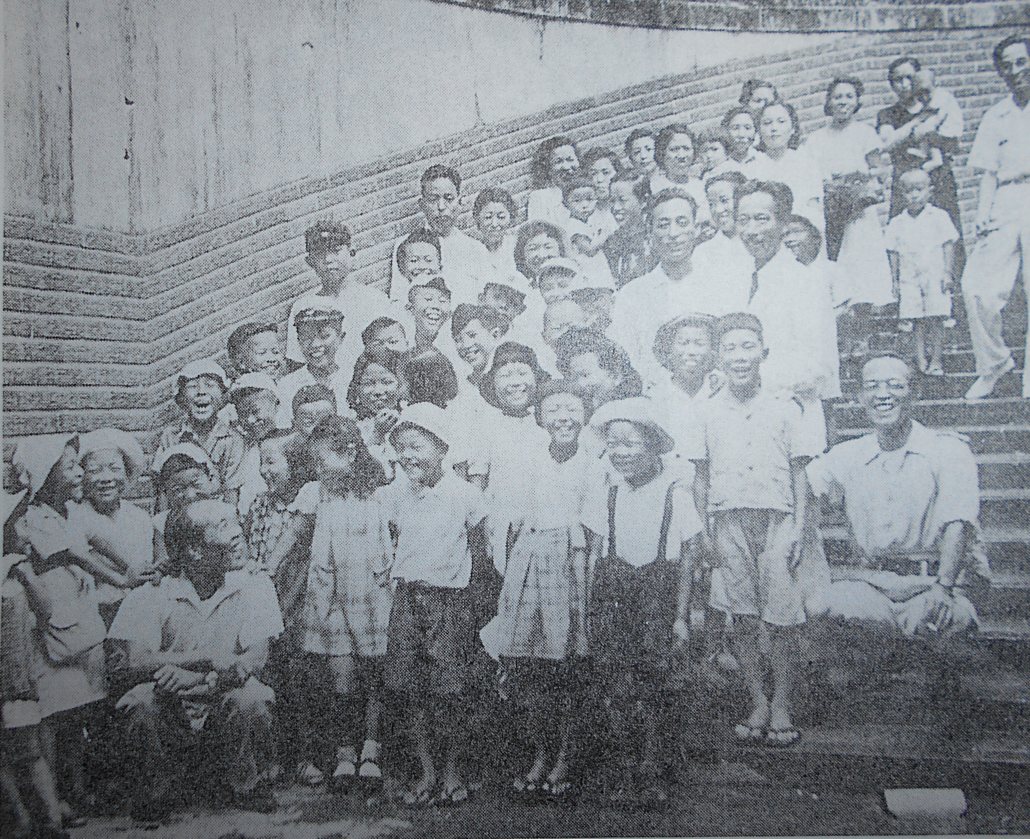 洋画家の北川民次が東山動物園に開設した夏季児童美術学校。